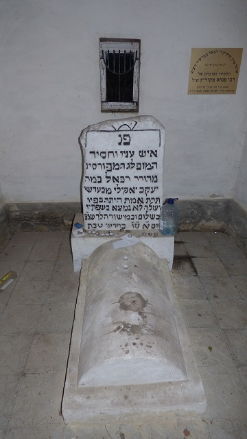 תמונת ציון קברו של רבי רפאל מברשד